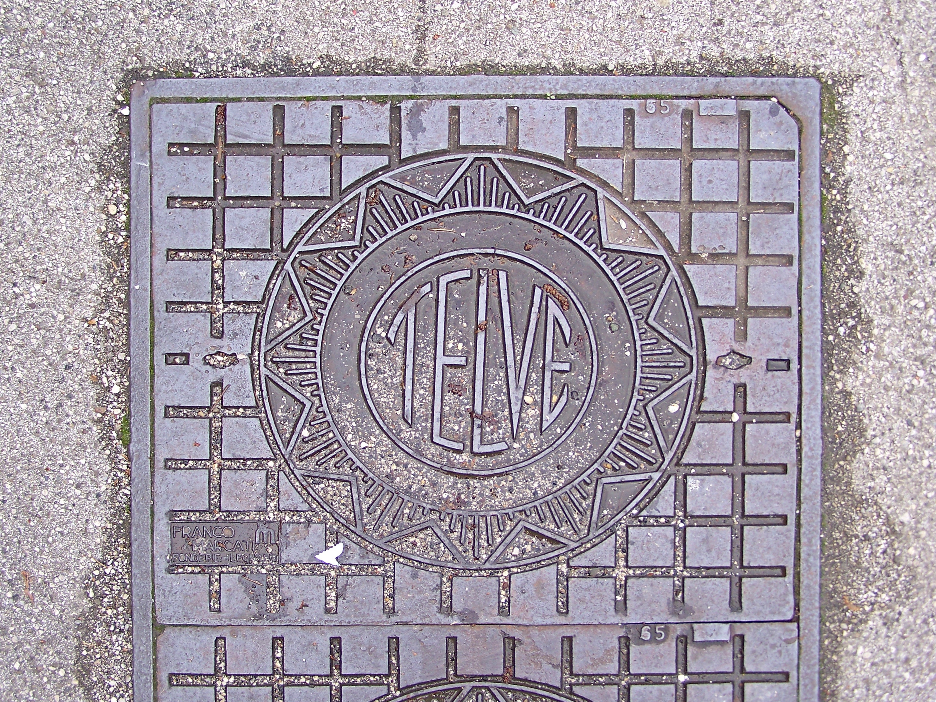 Tombino della Società Telefonica delle Venezie (TELVE) nei pressi di Udine